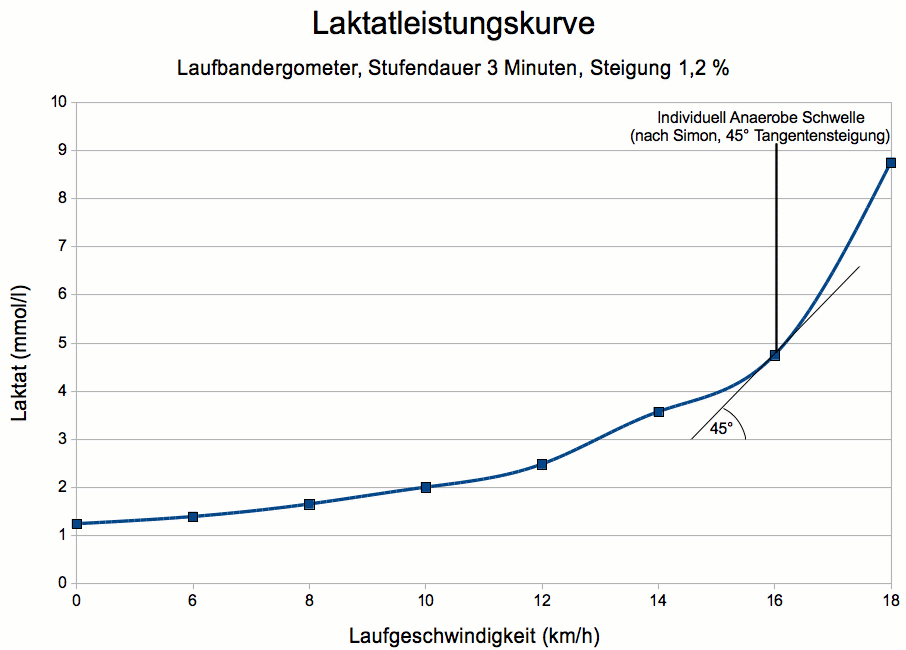 Laktatleistungskurve eines Laufband-Ergometertests mit einer Stufendauer von 3 Minuten und einer Steigung von 1,2 %. Die individuelle anaerobe Schwelle wurde nach der Methode von Simon (45° Tangentensteigung) festgelegt.